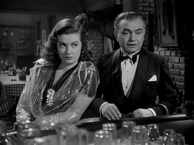 「スカーレット・ストリート」におけるエドワード・G・ロビンソンとジョーン・ベネット